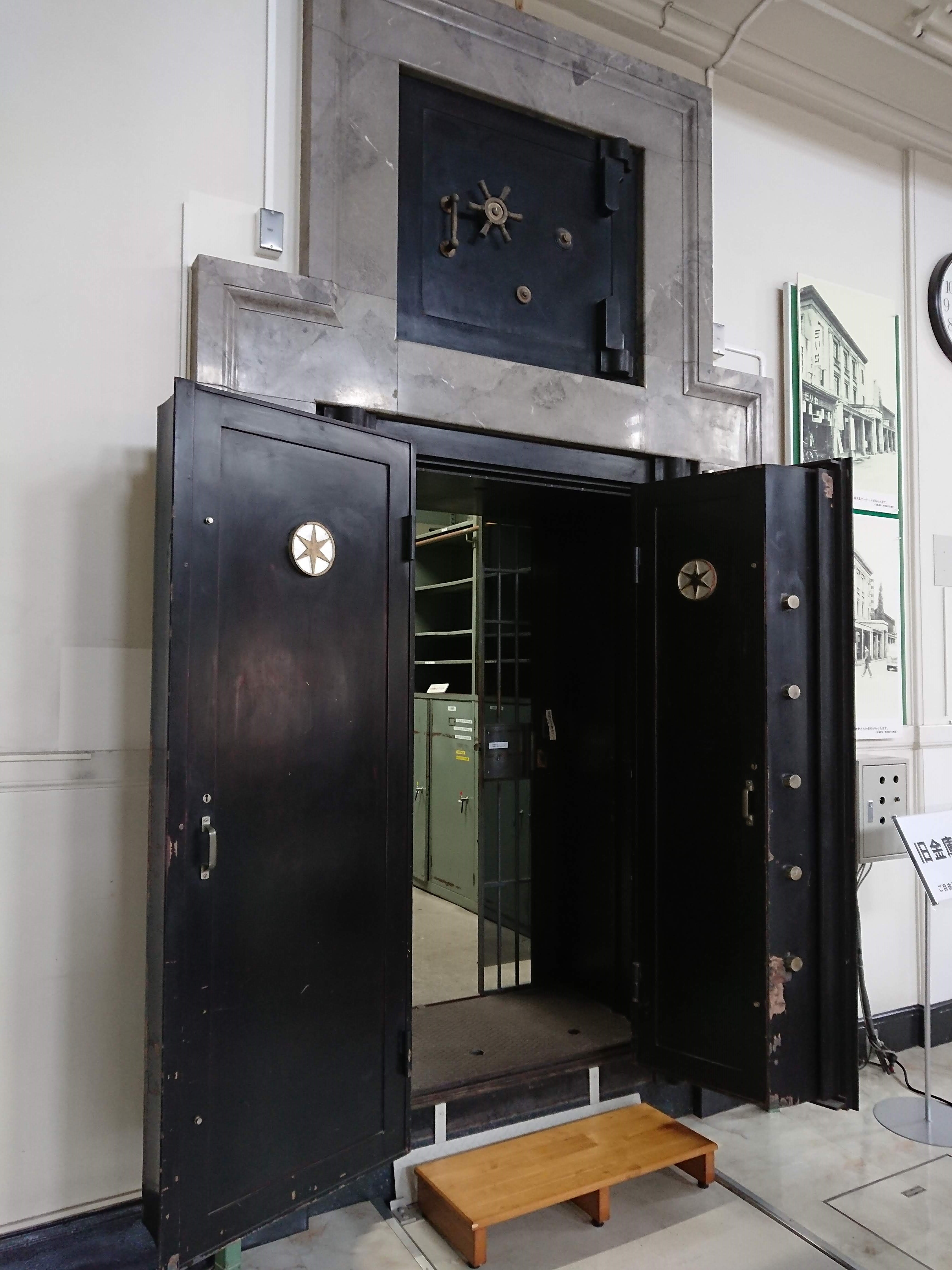 第四銀行（旧）高田支店の金庫（第四銀行の行章が見受けられる）